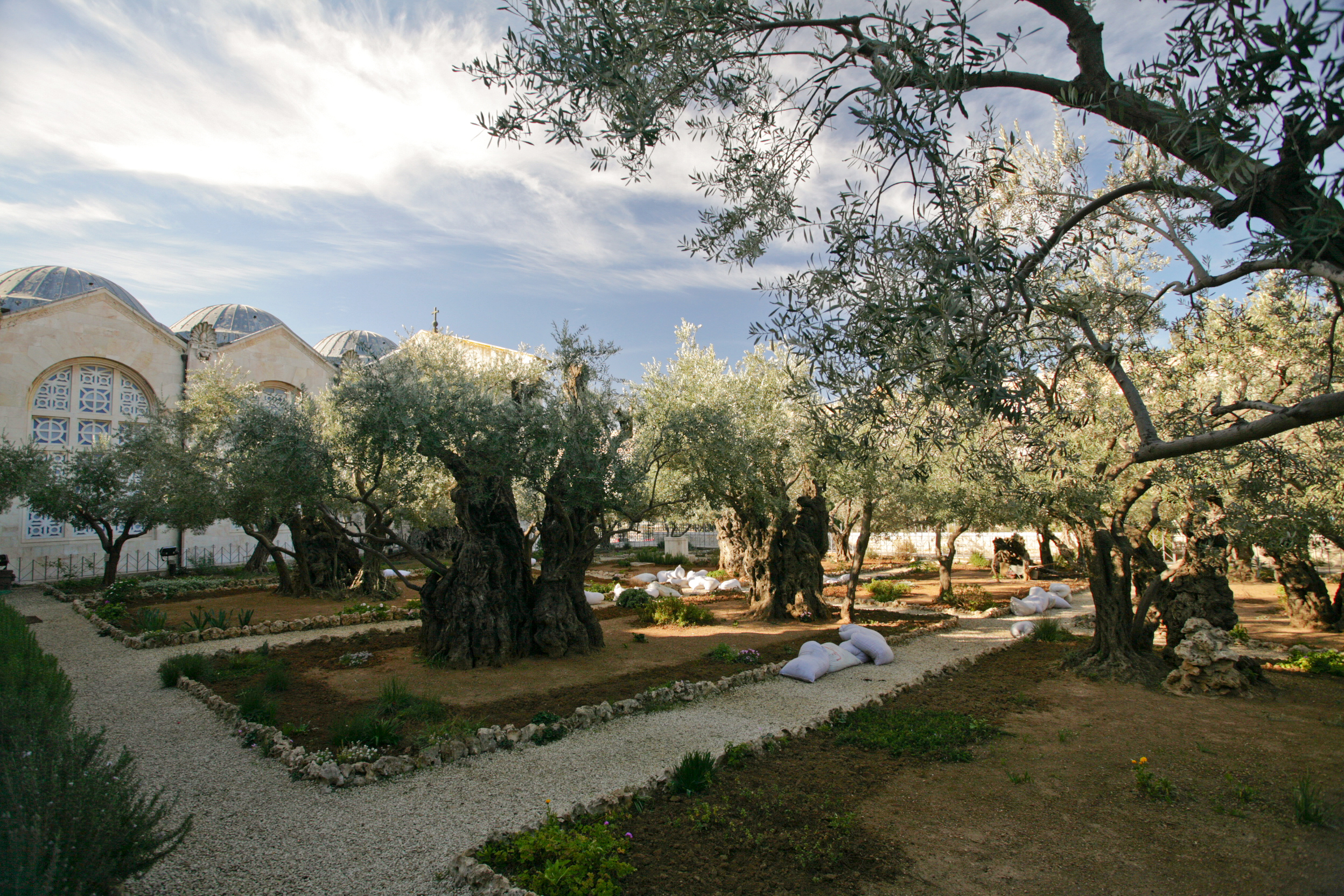 Gethsemane Garden (Mount of Olives) in Jerusalem